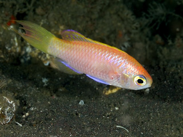 テンジクハナダイ Grammatonotus surugaensis